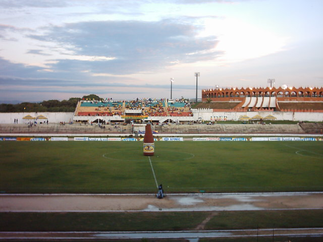 Estadio Olímpico Jaime Morón León (Cartagena de Indias, Colombia)